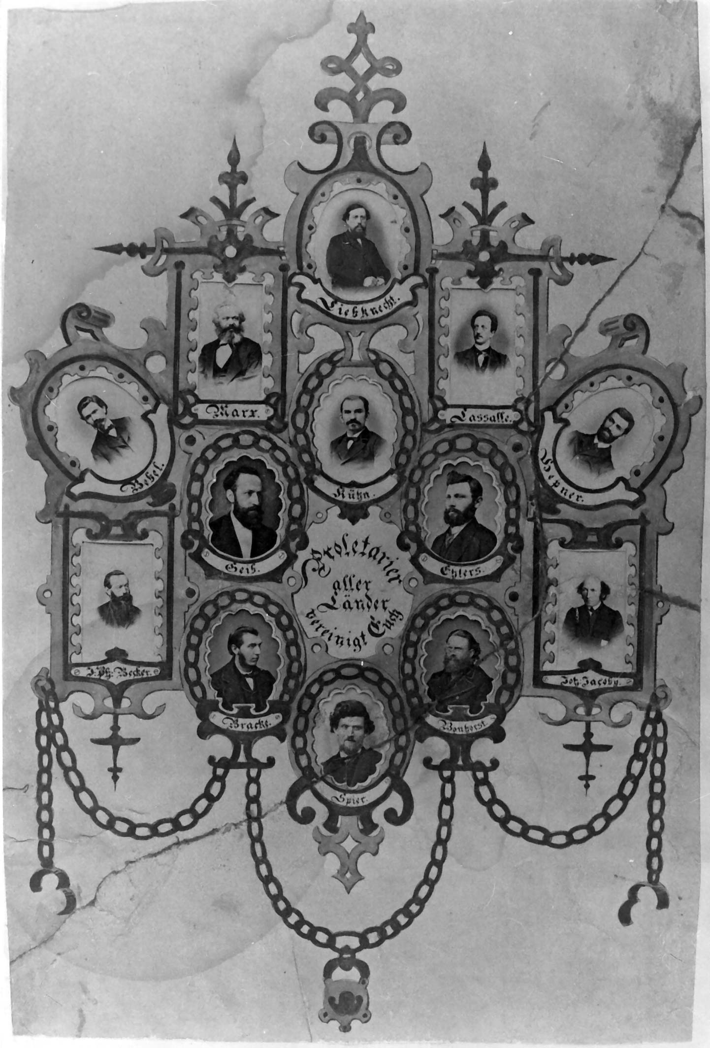 Das Kettenbild zeigt die frühen Akteure der sozialdemokratischen Partei und gelang als Plakat nach deren Verhaftung 1870 in Umlauf.